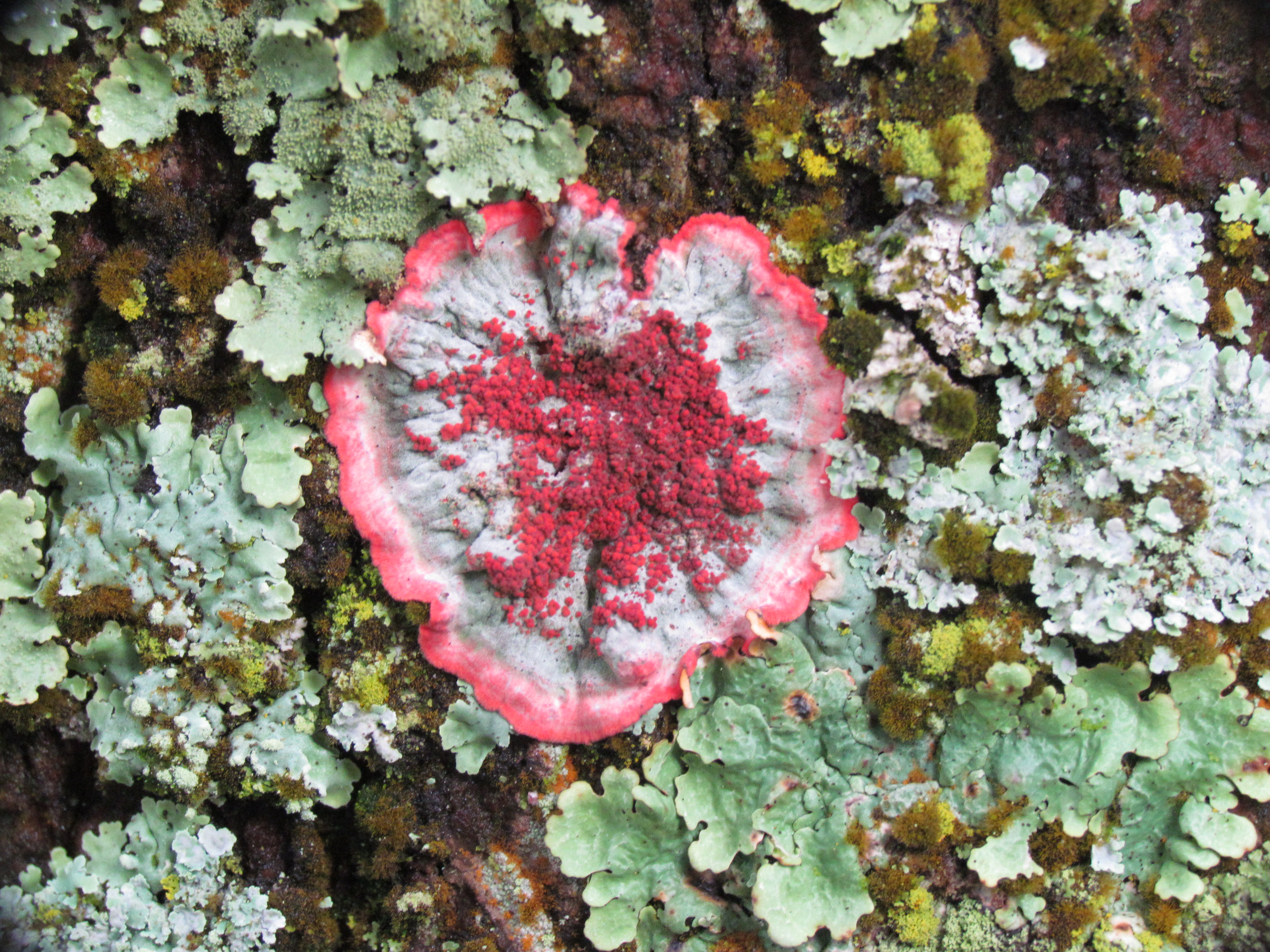 Líquen sobre os troncos de árvores